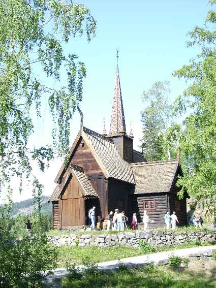 Church in Maihaugen in Norway